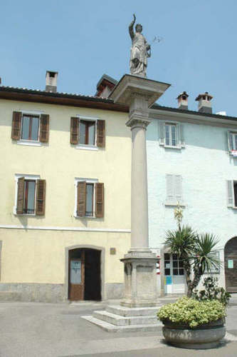 Rancate